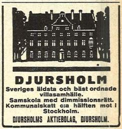 Annons, Djursholm 1914 i tidningen Idun